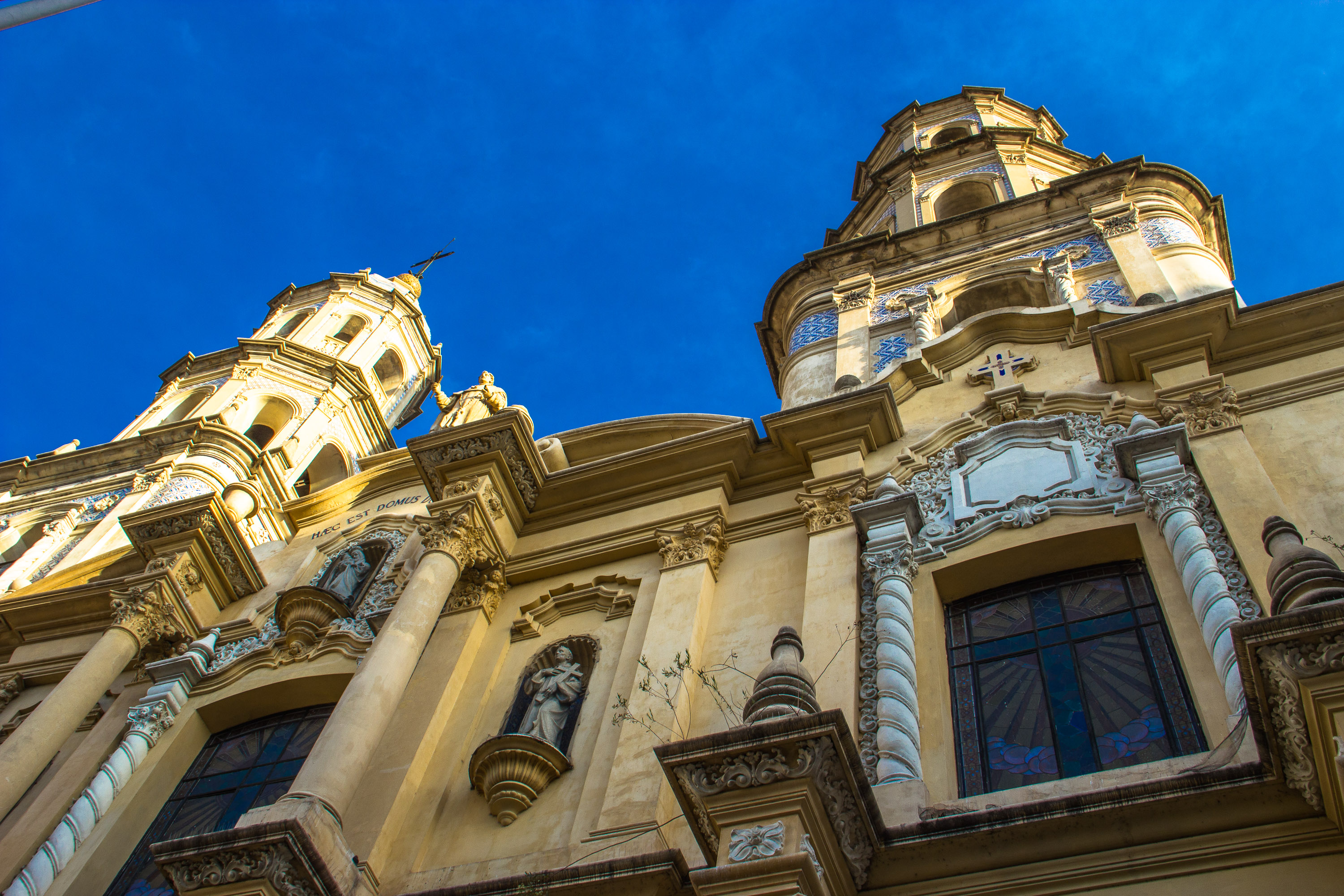 Iglesia de San Pedro González Telmo, cúpulas.